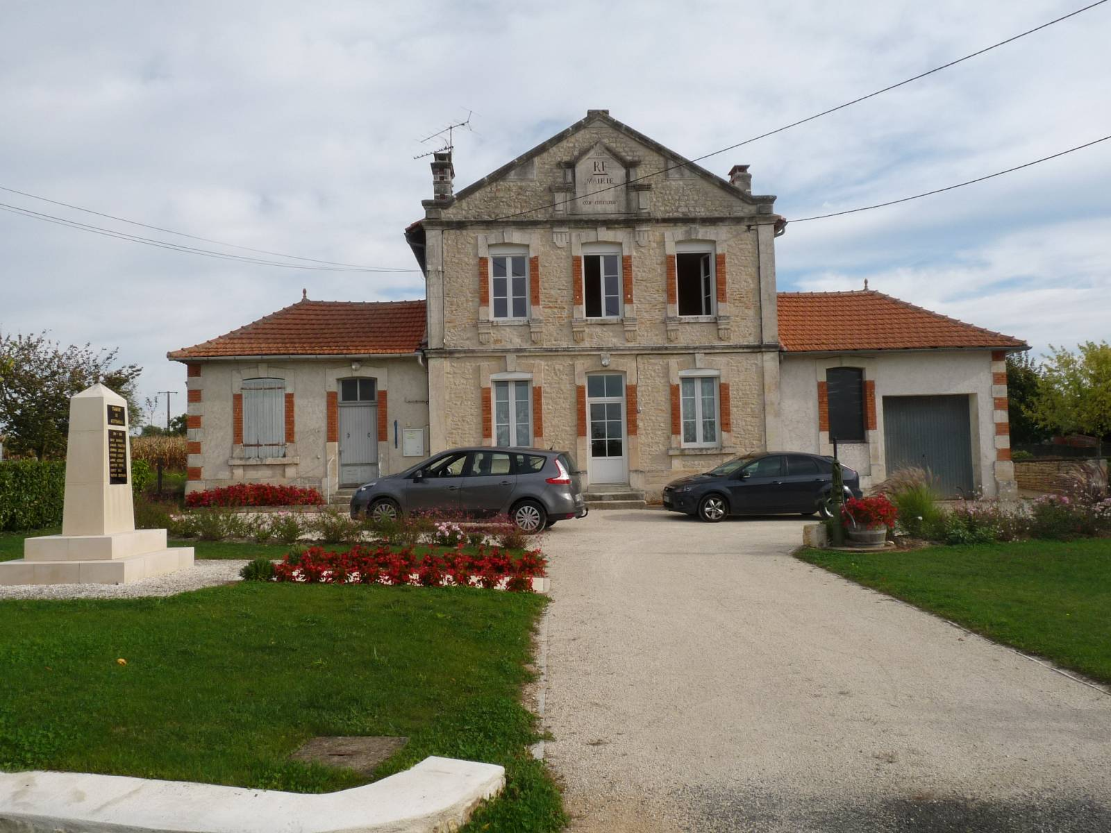 mairie de Moutonneau, Charente, France